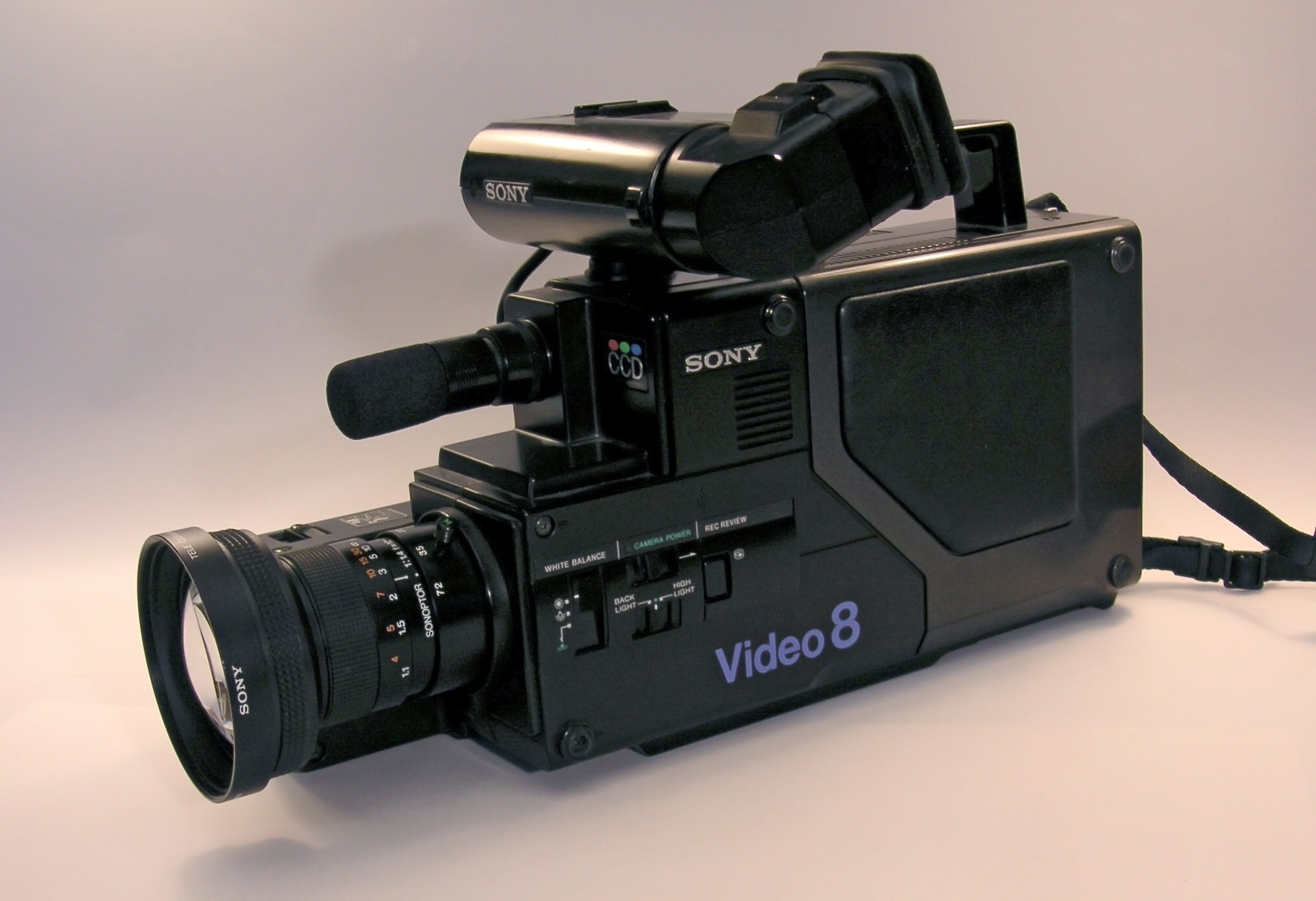 Sony Video 8 camera CCD-V8AF, 1985